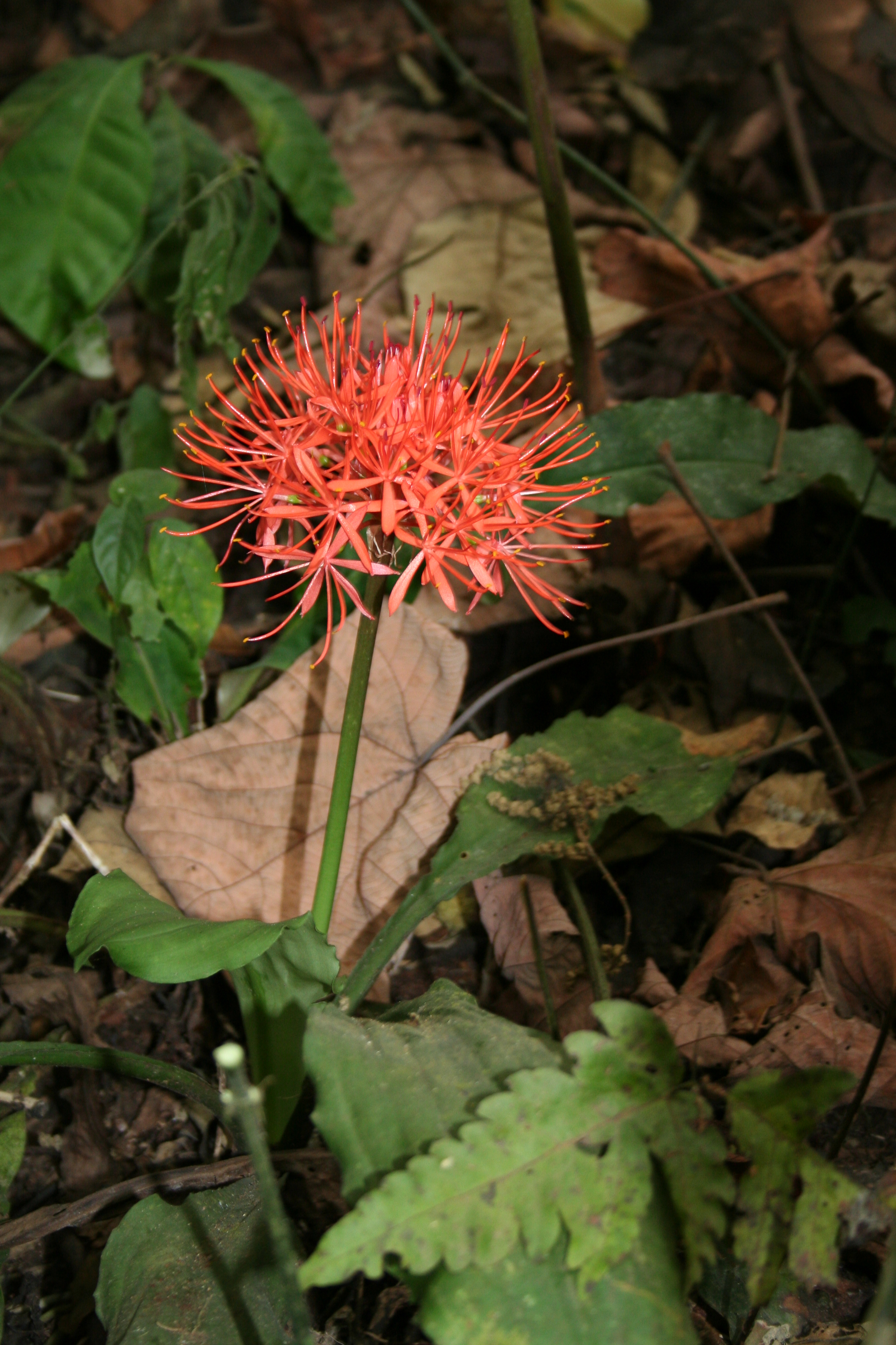 Scadoxus cinnabarinus, Mt. Cameroon